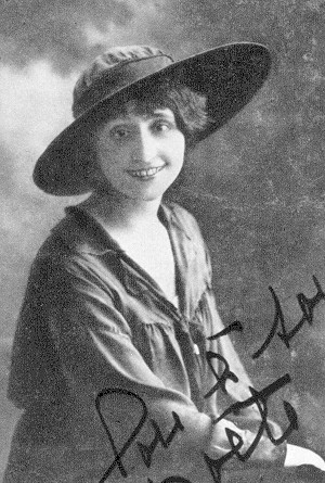 Photo de Louise de Coligny-Chatillon, amante de Guillaume Apollinaire